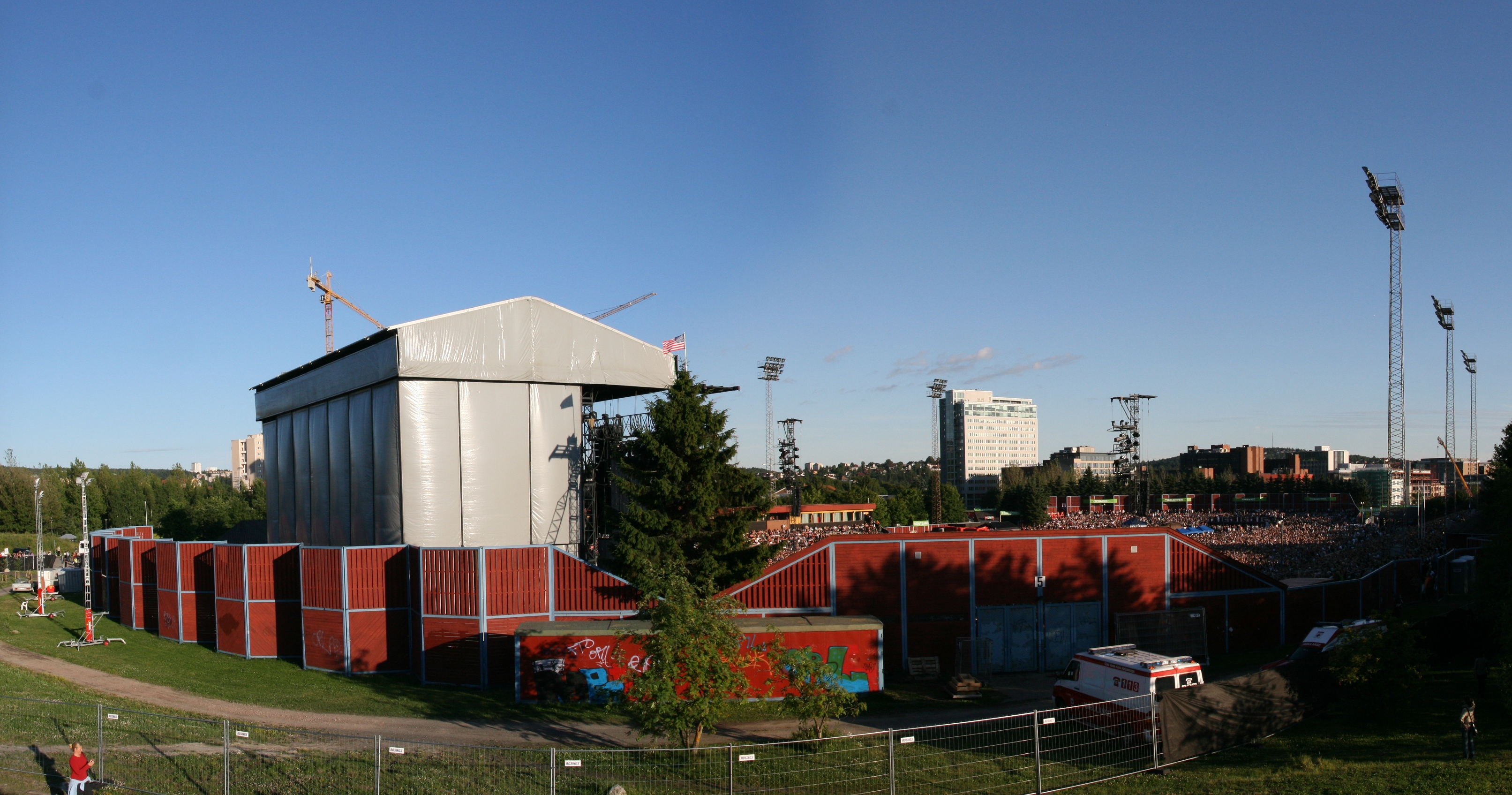 Valle Hovin på Helsfyr i Oslo, like før en Bruce Springsteen-konsert